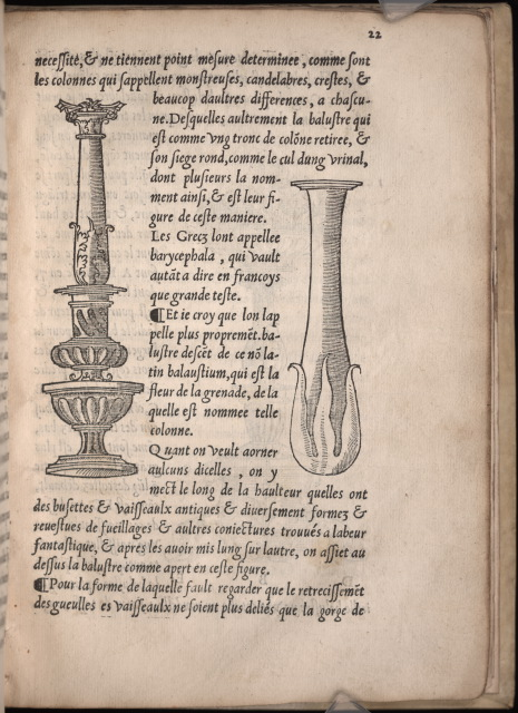 Diego de Sagredo: Raison d'architecture antique. Simon des Colines: Paris, 1542.